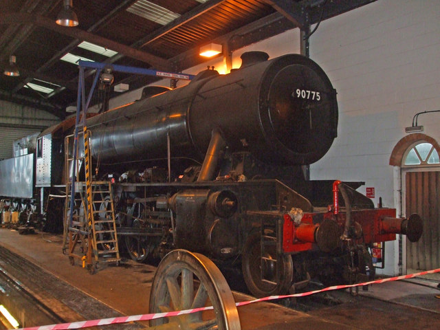 War Department 90775